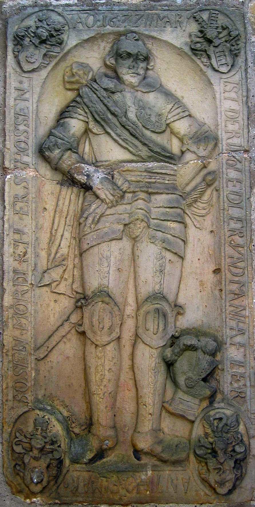 Grabplatte des „wohledlen und mannhaften Anthon Elmar(us) Bosen, mördlich erschossen am 11.3.1622“, dargestellt in voller Ritterrüstung, rechts neben dem Seitenportal der Mariä-Himmelfahrt-Kirche, Pömbsen, Bad Driburg, Deutschland.